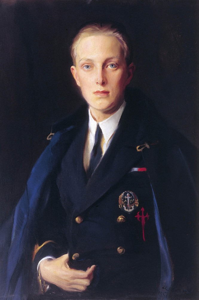 Retrato del Principe de Asturias